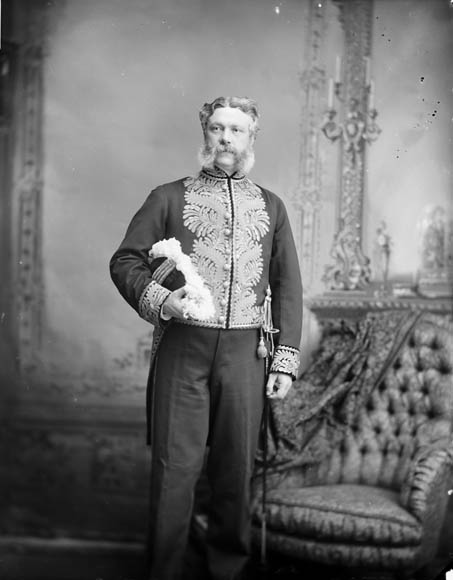 Lieut. Gov. Edgar Dewdney